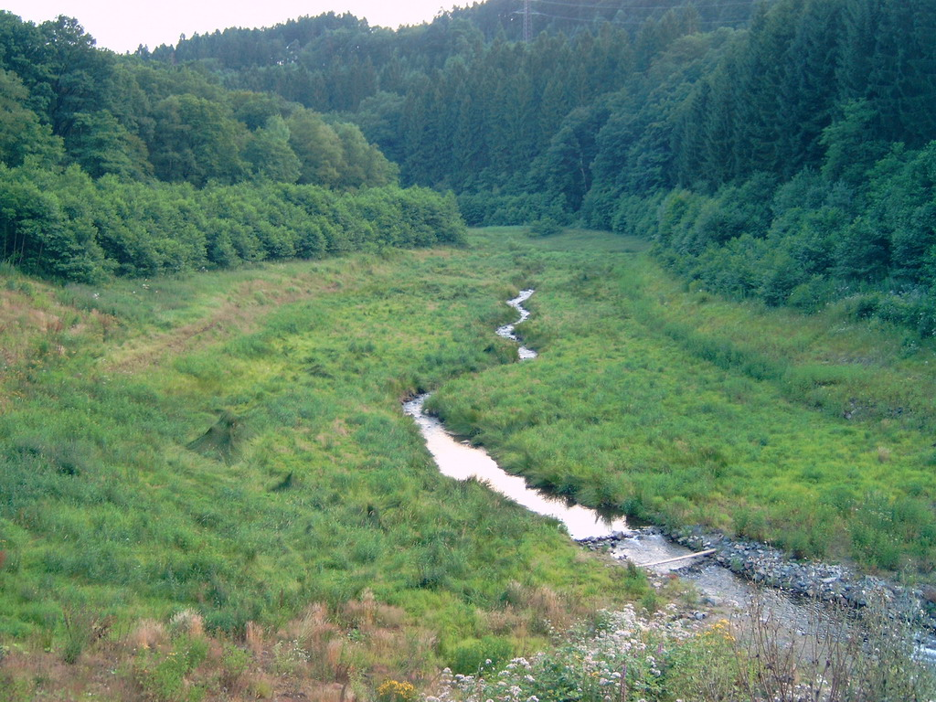 Der Stauraum